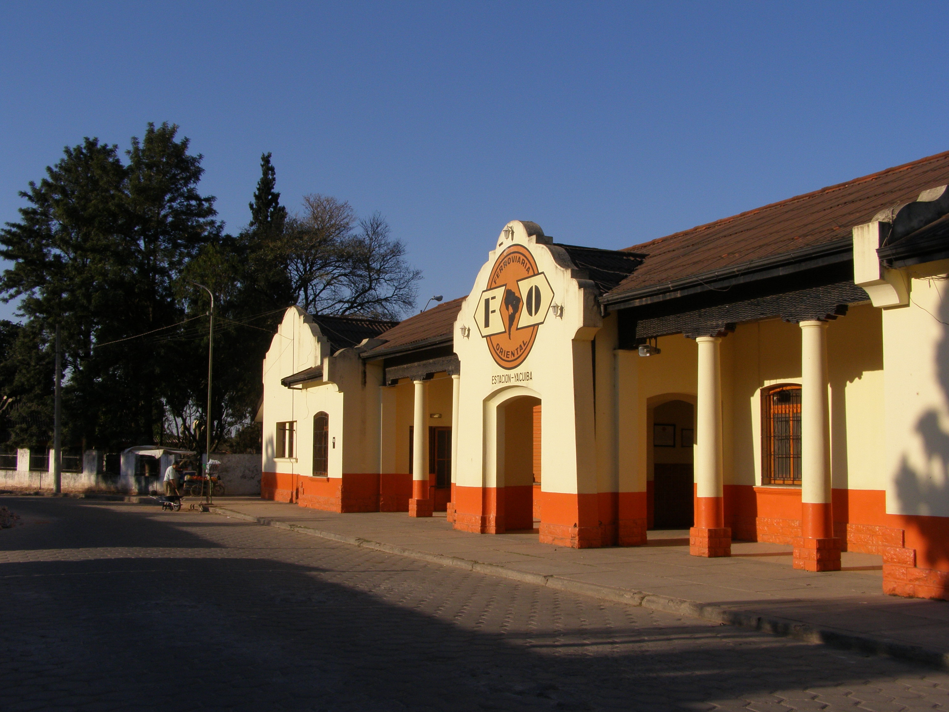 Yacuíba, Bolivia